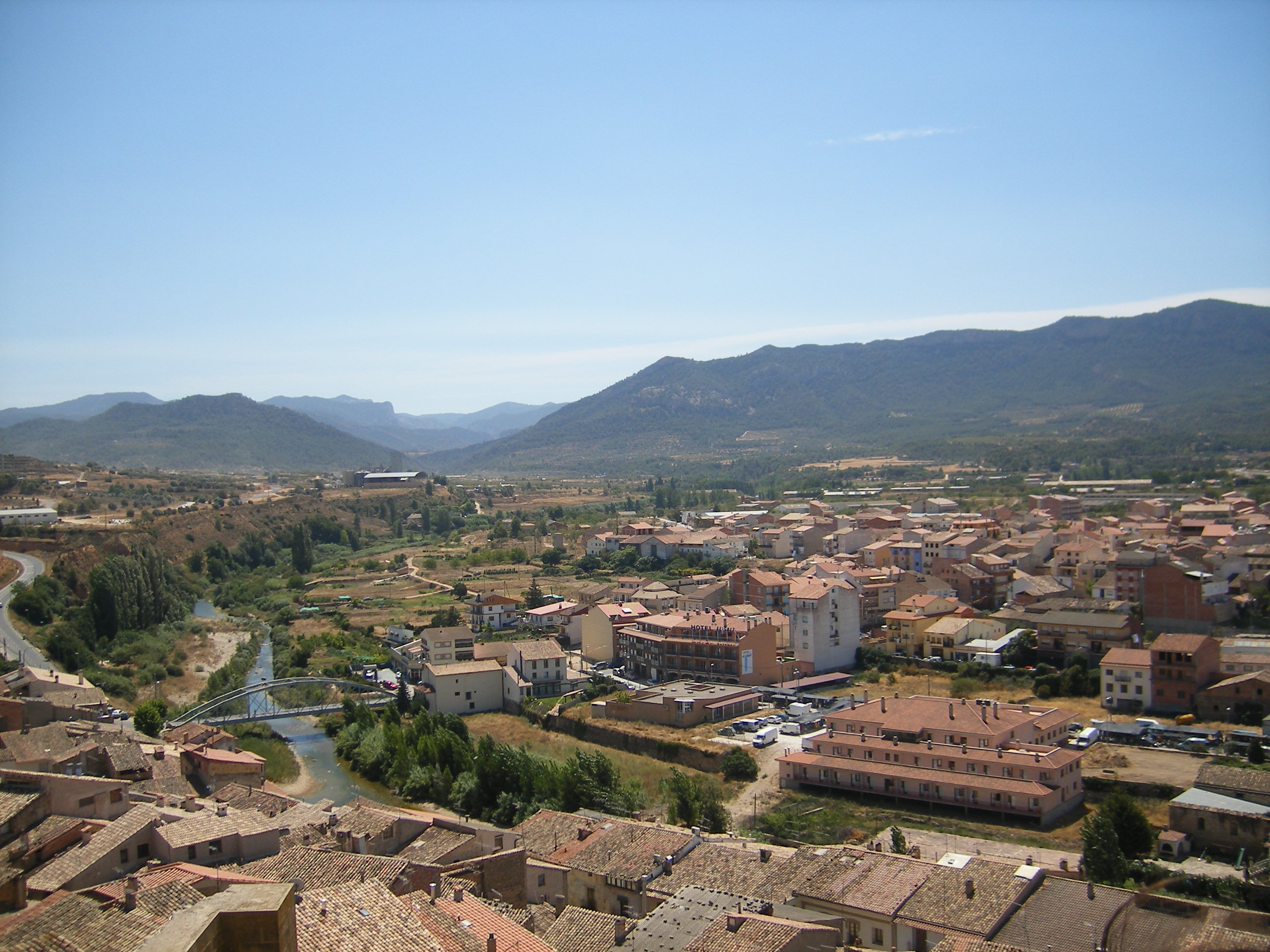 Aragonés: Anvista de Val de Robres (Aragón) dende lo suyo castiello-palacio.